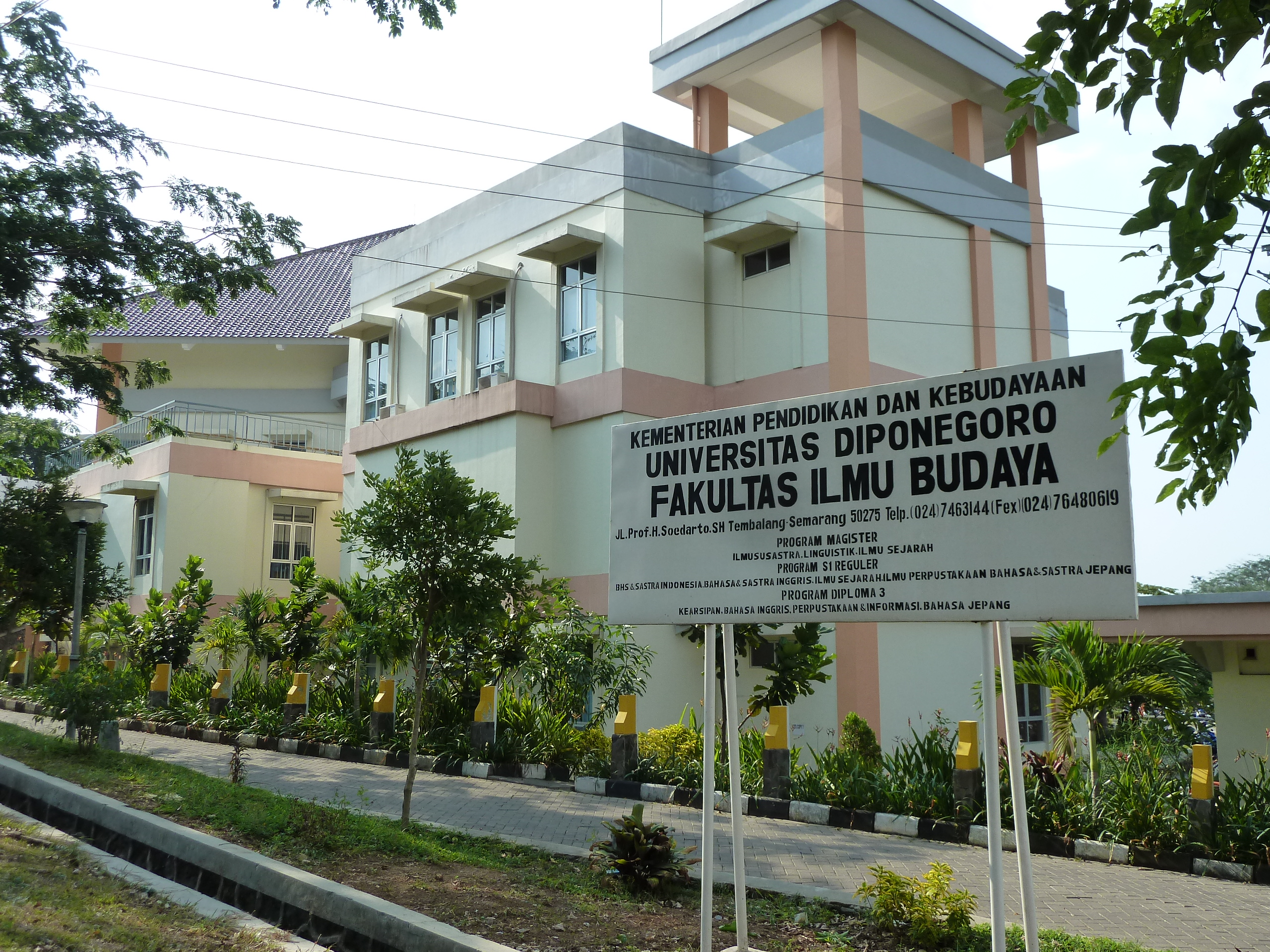 FIB UNDIP